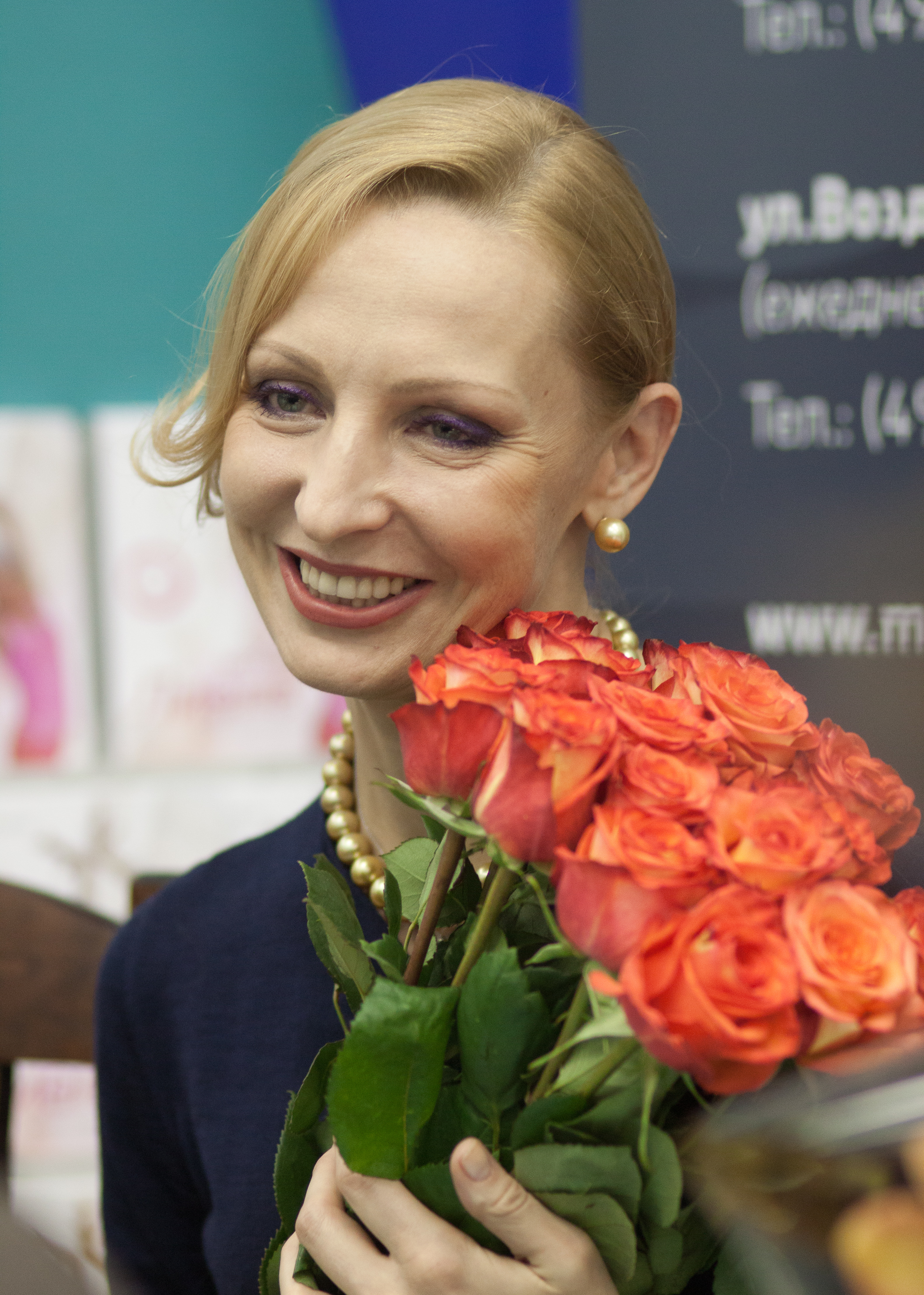 Балерина Илзе Лиепа